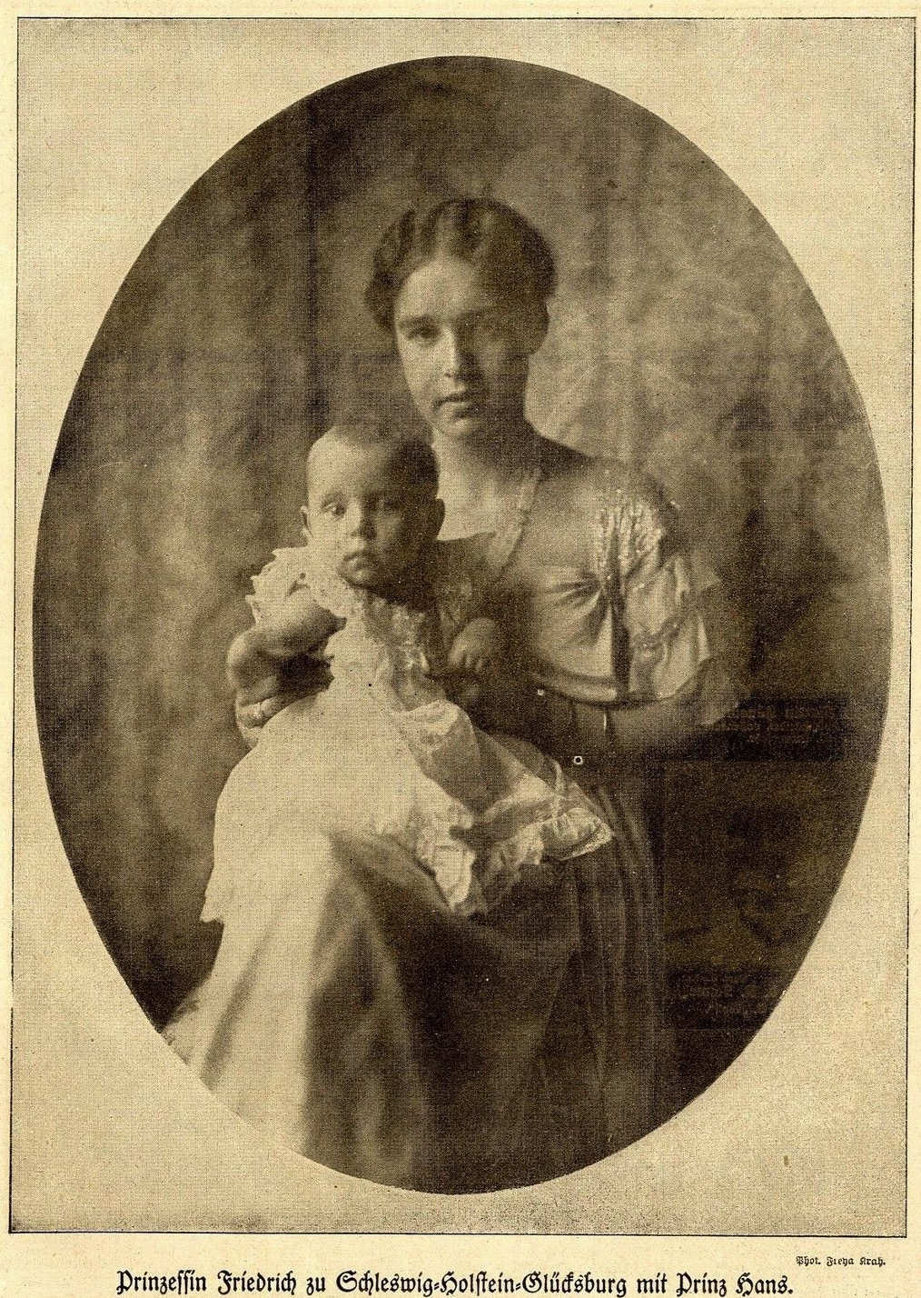 Prinzessin Friedrich zu Schleswig- Holstein-Glücksburg mit Prinz Hans, 1918